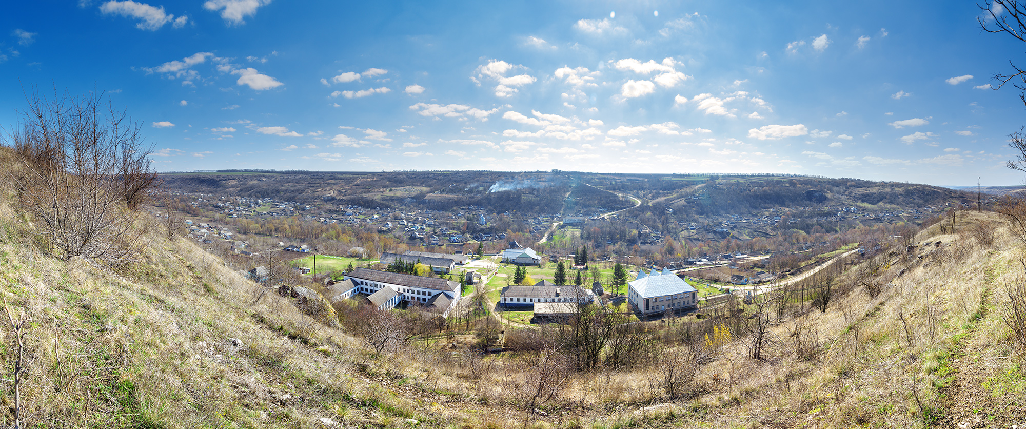 «Вище школи», Піщанський район, Болганська сільська рада (західна частина с. Болган)